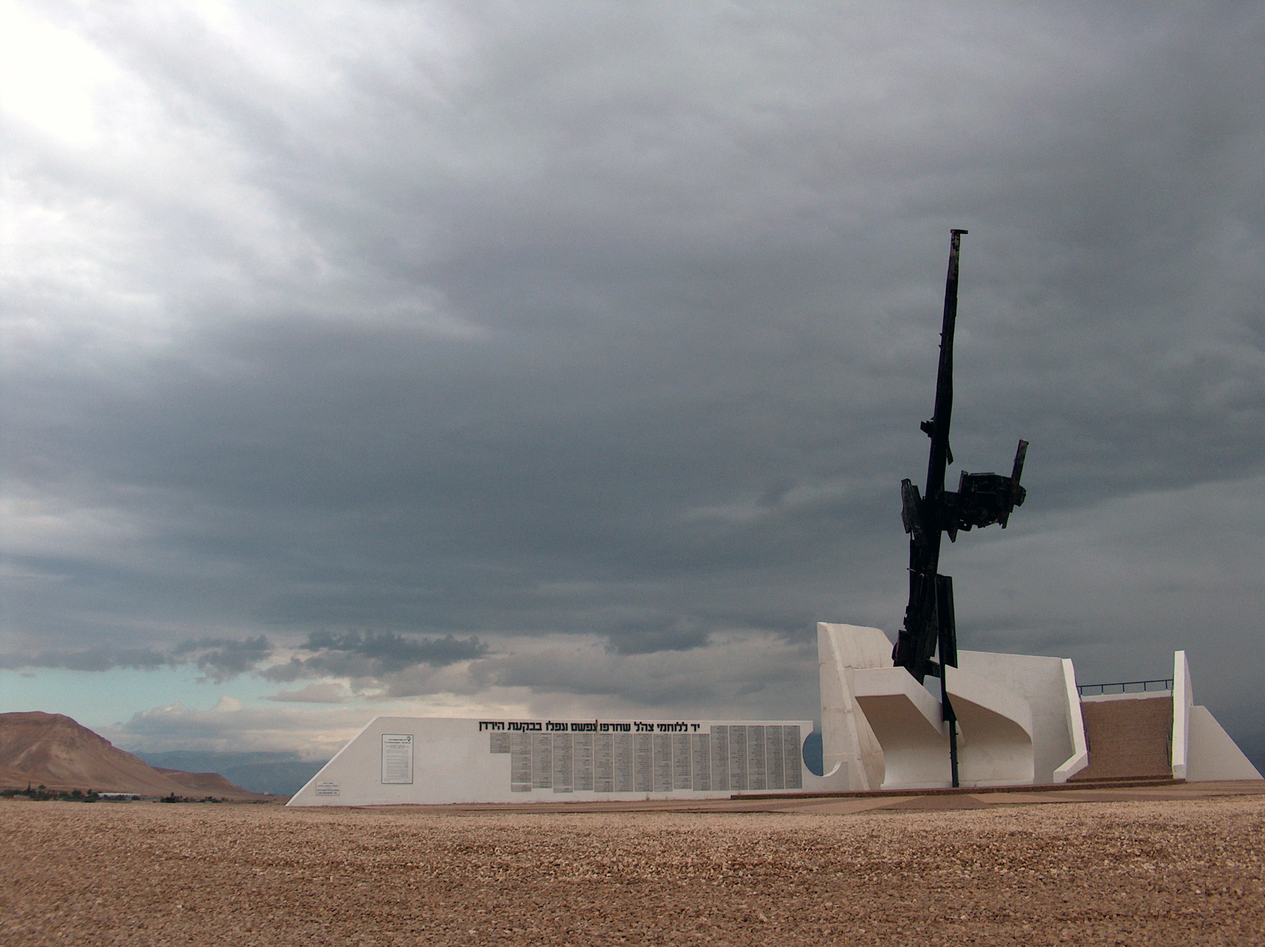 אנדרטת הבקעה בתכנונו של הפסל זוכה פרס ישראל יגאל תומרקין, הממוקמת בבקעת הירדן סמוך ליישוב פצאל. רישיון * אם את/ה מעוניינ/ת לעשות שימוש בתמונה, אזי את הקרדיט הענק/י לצלם הנאמן מיכאל יעקובסון. אשמח לדעת שאת/ה עושה זאת באי מייל שלי: benben24walla.co.il - ושם גם תוכל/י לקבל מידע נוסף.